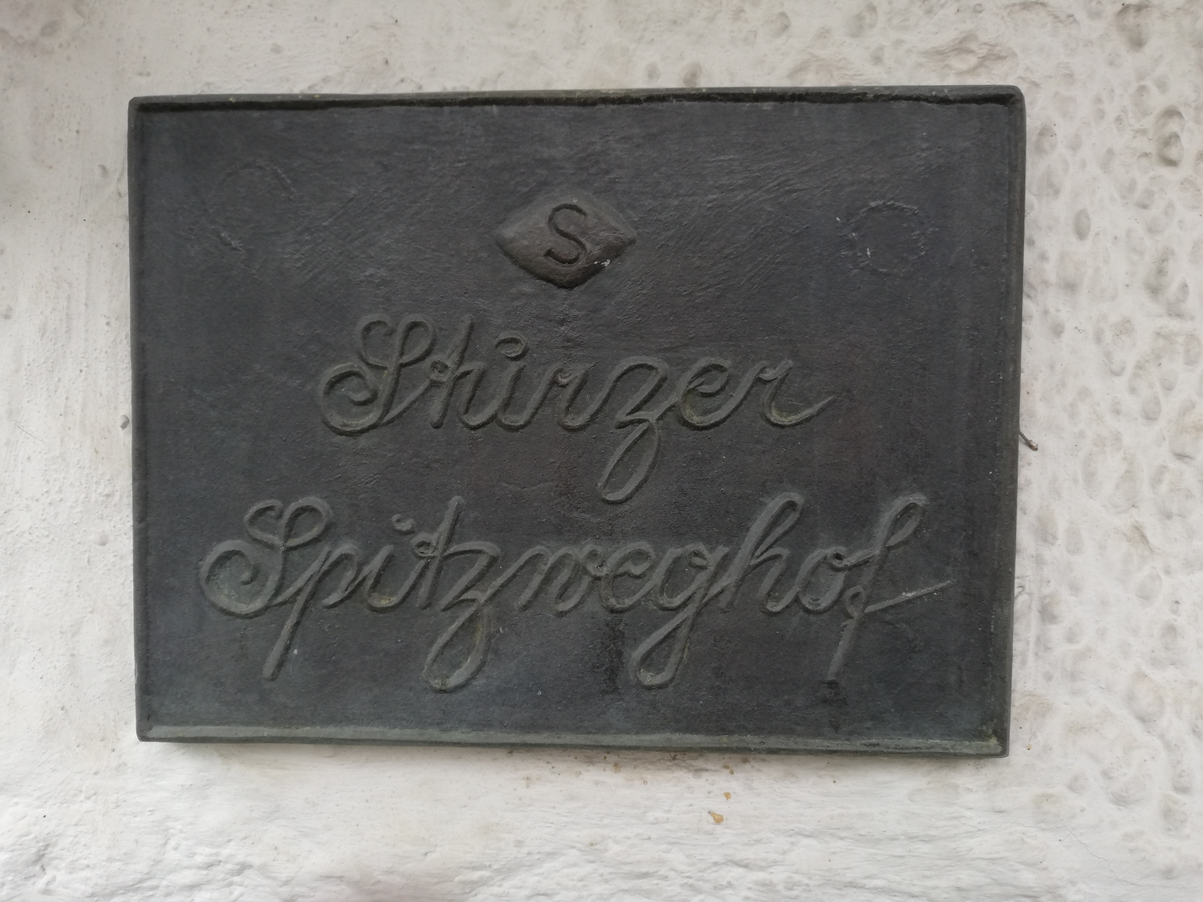 Schild